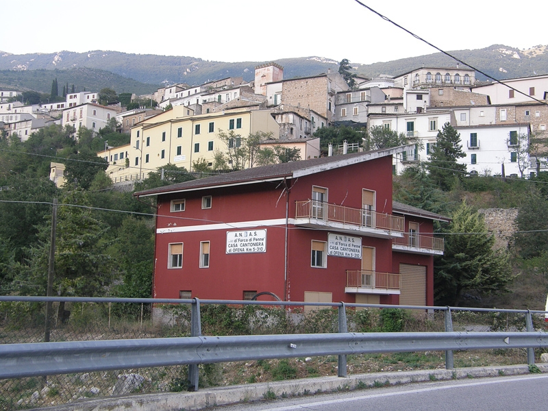 Ofena